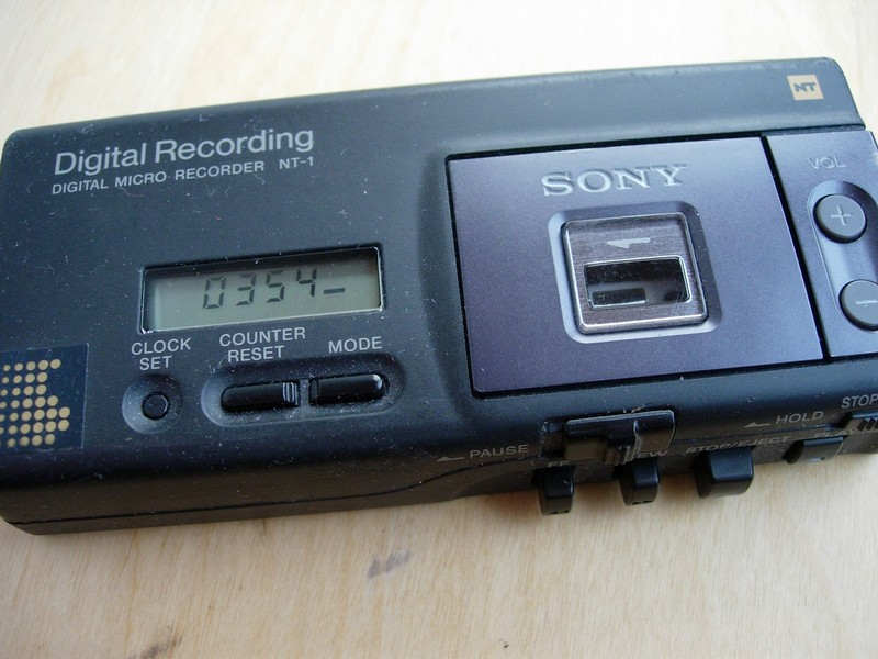 Sony Scoopman NT-1 Digital Audio Recorder